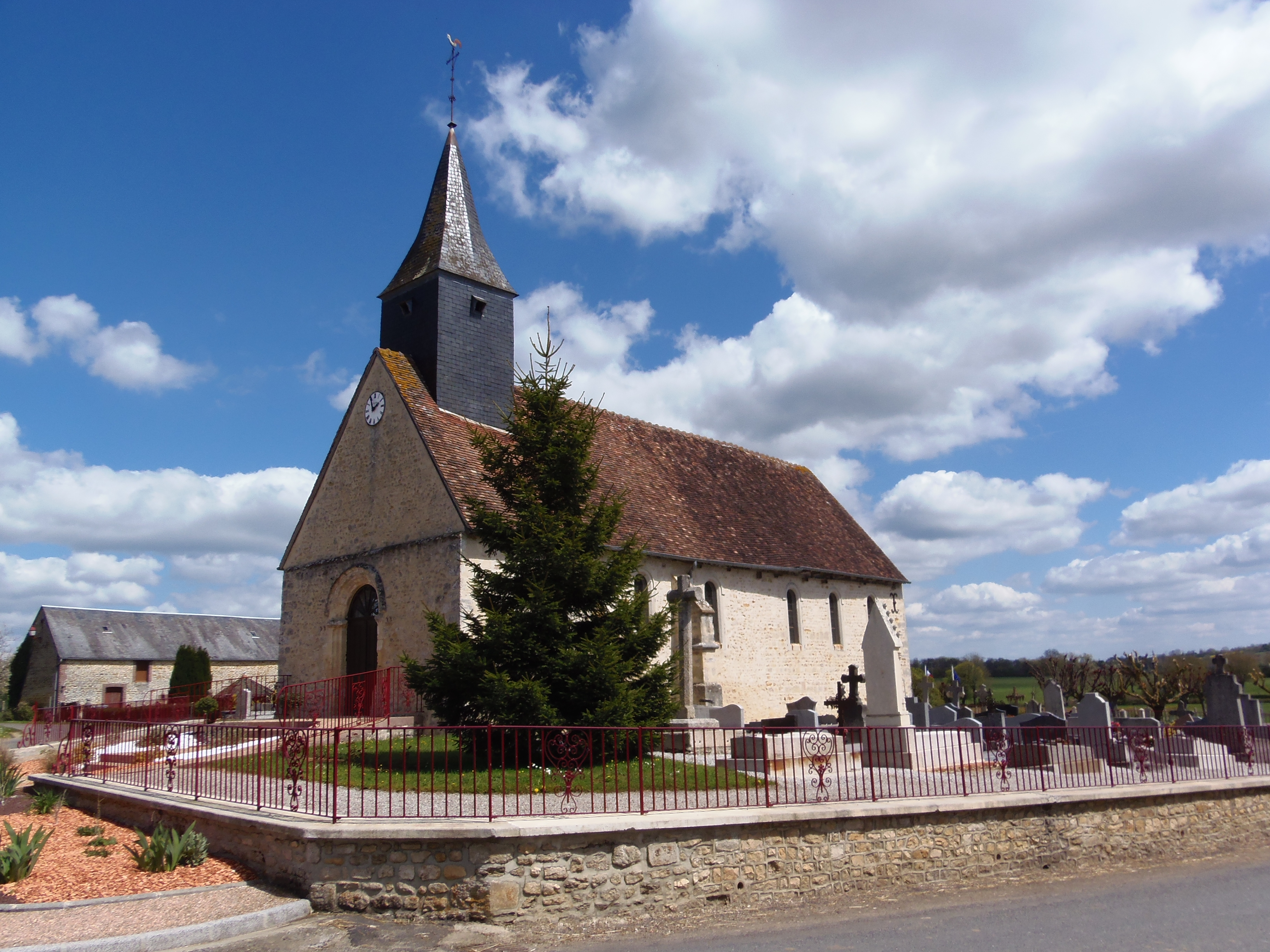 Le Ménil-Guyon (Normandie, France). L'église Notre-Dame.